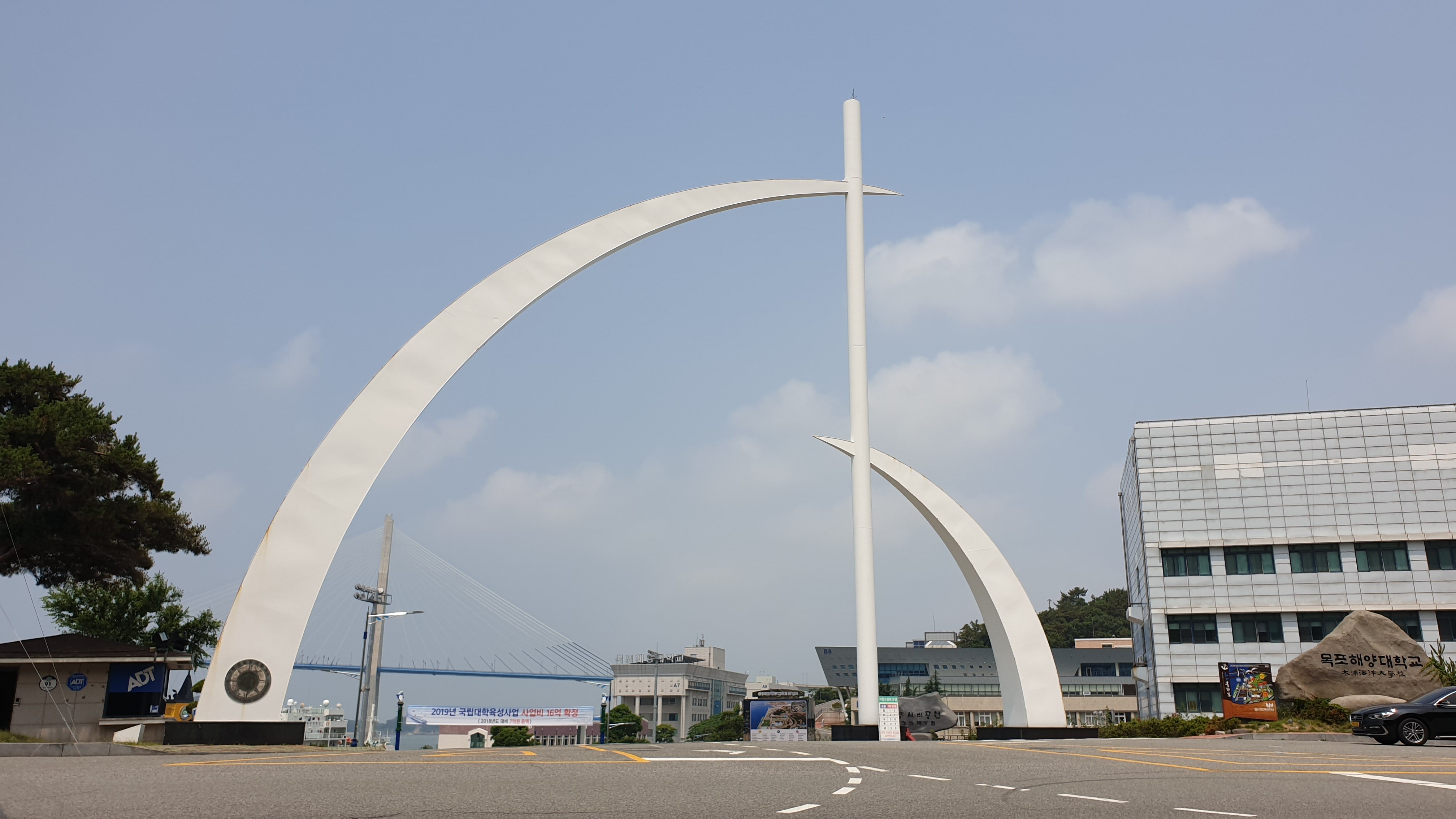 gate of Mokpo national maritime univ